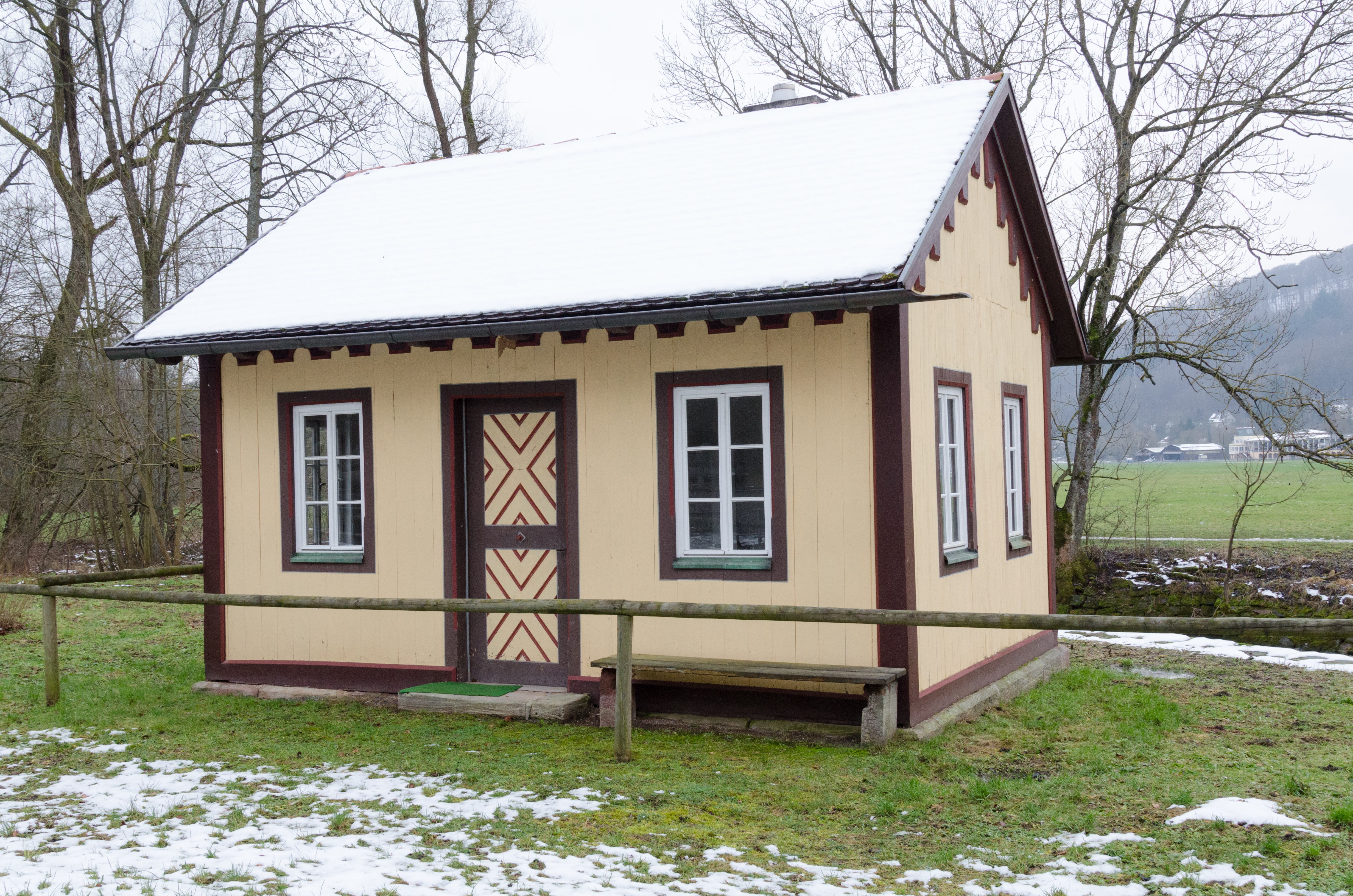 Bad Kissingen, Hausen, Untere Saline, Pumpenwärterhaus